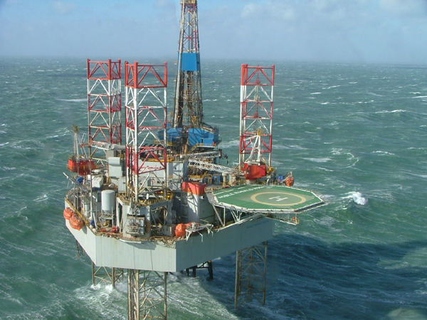 Sturm über der Nordsee, 2007